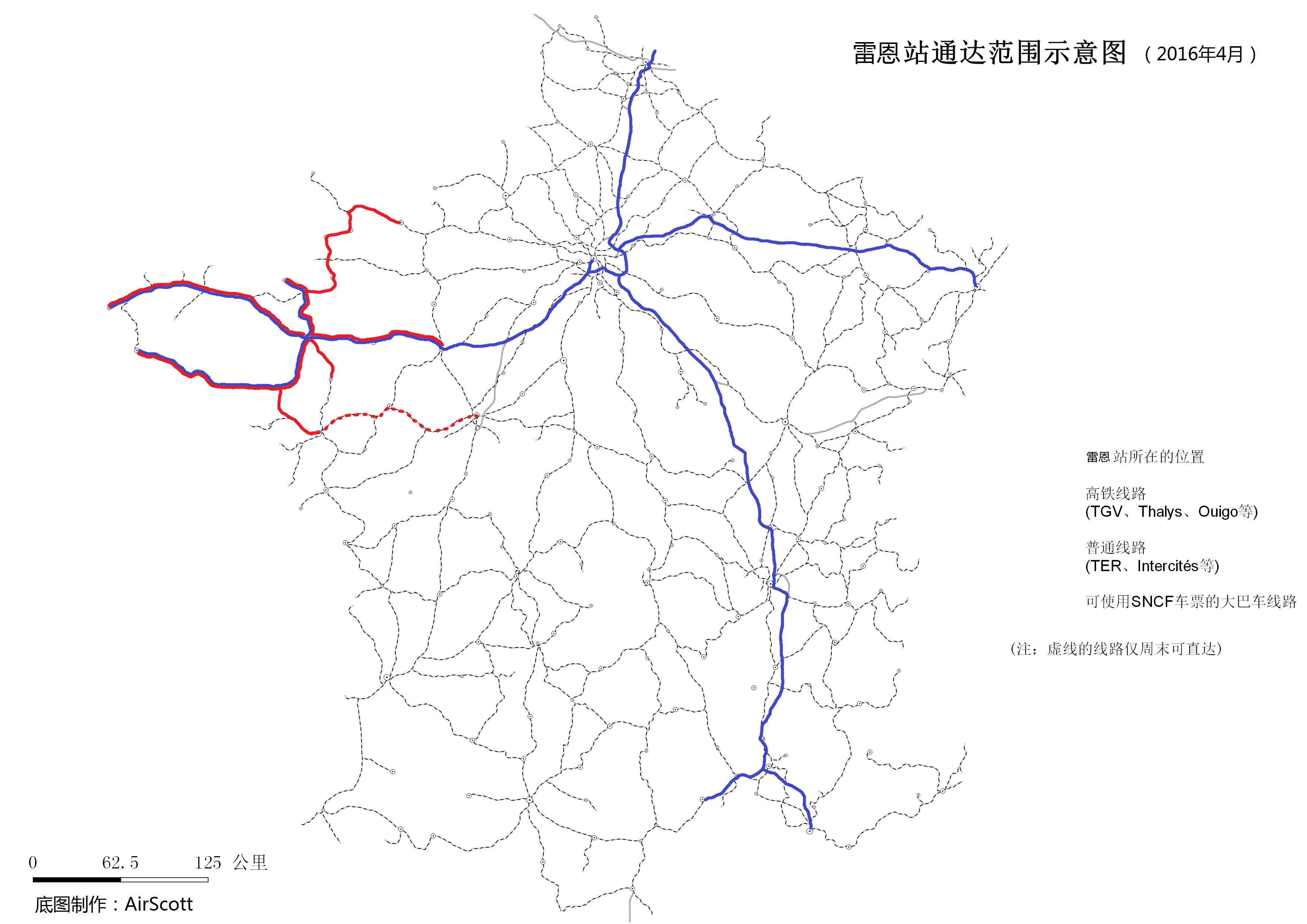 雷恩站通达范围(2016年4月)